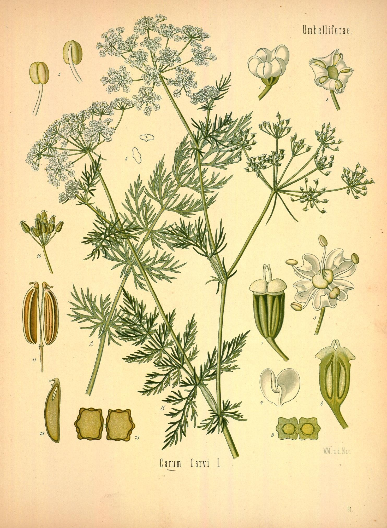 Kümmel. A unteres Blatt, natürl. Grösse; B oberer Theil der Pflanze, desgl.; 1 u. 2 noch nicht entfaltete Blüthe von verschiedenen Seiten, vergrössert; 3 Blüthe, vollständig entwickelt, desgl.; 4 Kronblatt, desgl.; 5 Staubgefässe, desgl.; 6 Pollen, desgl.; 7 Stempel, desgl.; 8 derselbe im Längsschnitt, desgl.; 9 Fruchtknoten im Querschnitt, desgl.; 10 Fruchtdöldchen, etwas vergrössert; 11 reife Frucht, vergrössert; 12 Theilfrüchtchen im Längsschnitt, desgl.; 13 Frucht im Querschnitt, desgl.